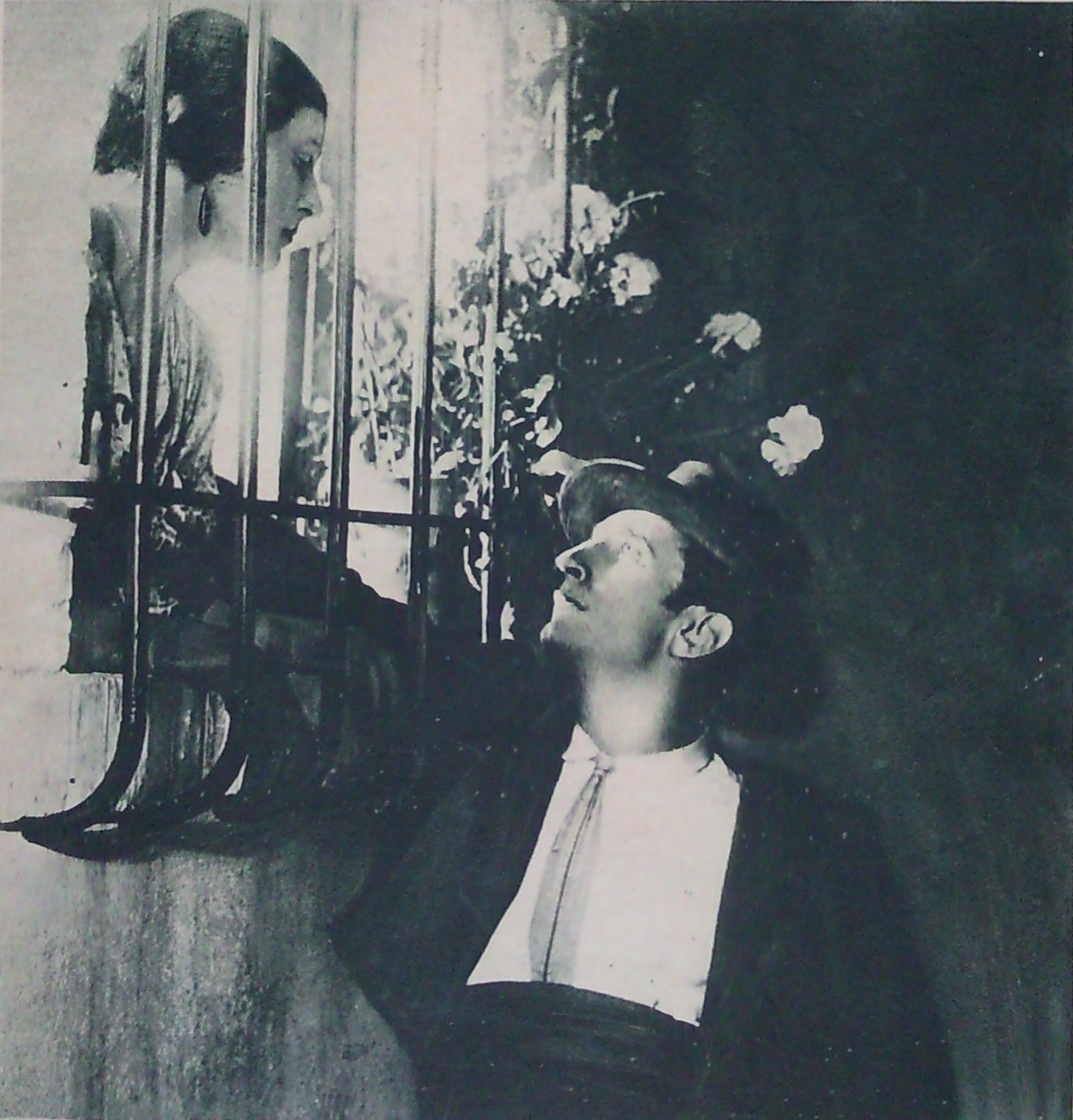 Aux jardins de Murcie est un film français réalisé par Louis Mercanton et René Hervil, tourné en 1923 à la ferme Turot, à Saint-Denis-du-Sig en Algérie. C'est la première adaptation de la pièce de Feliu Condina.